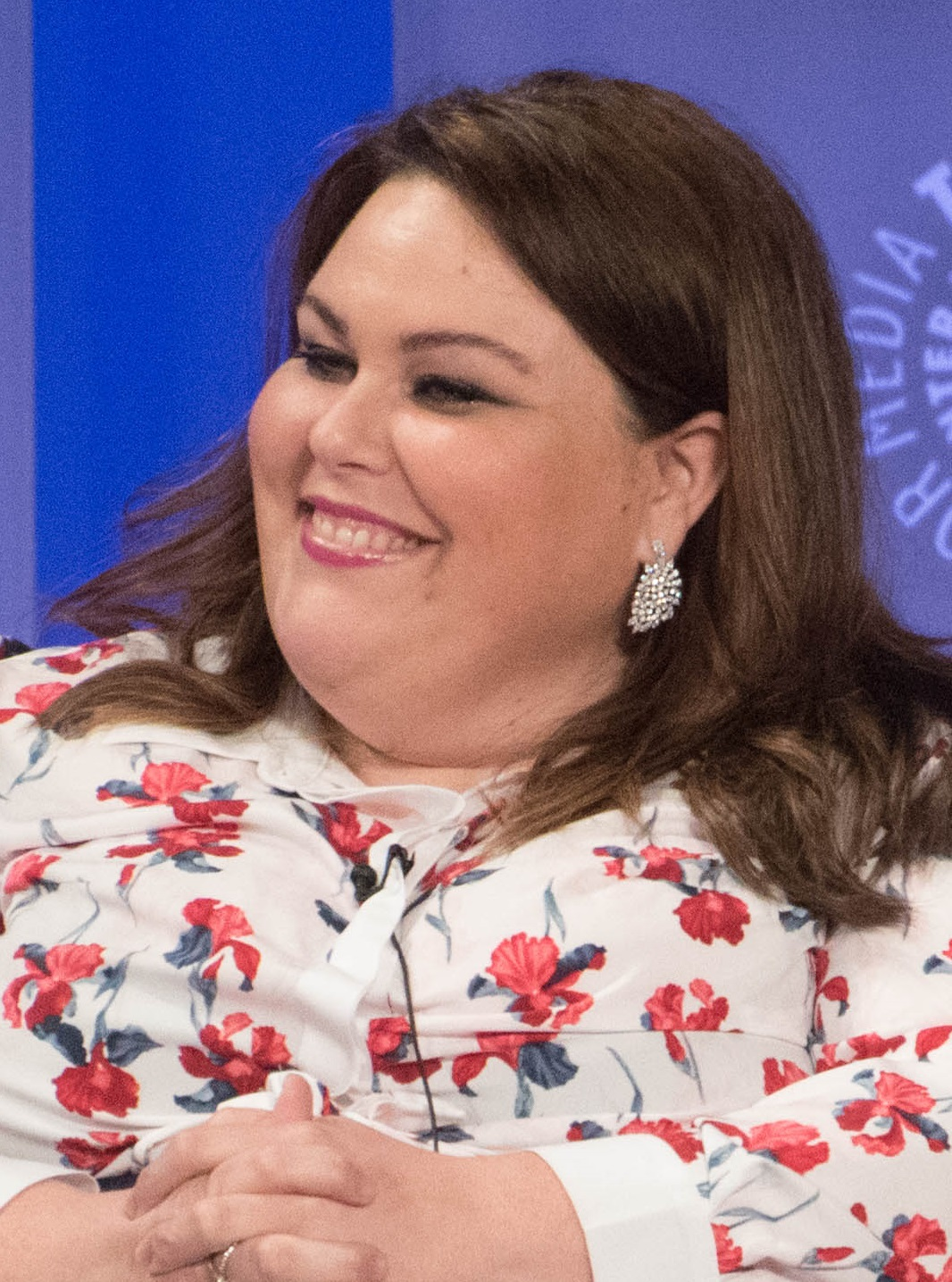 Actress Chrissy Metz at the 2017 paleyfest to promote This is us